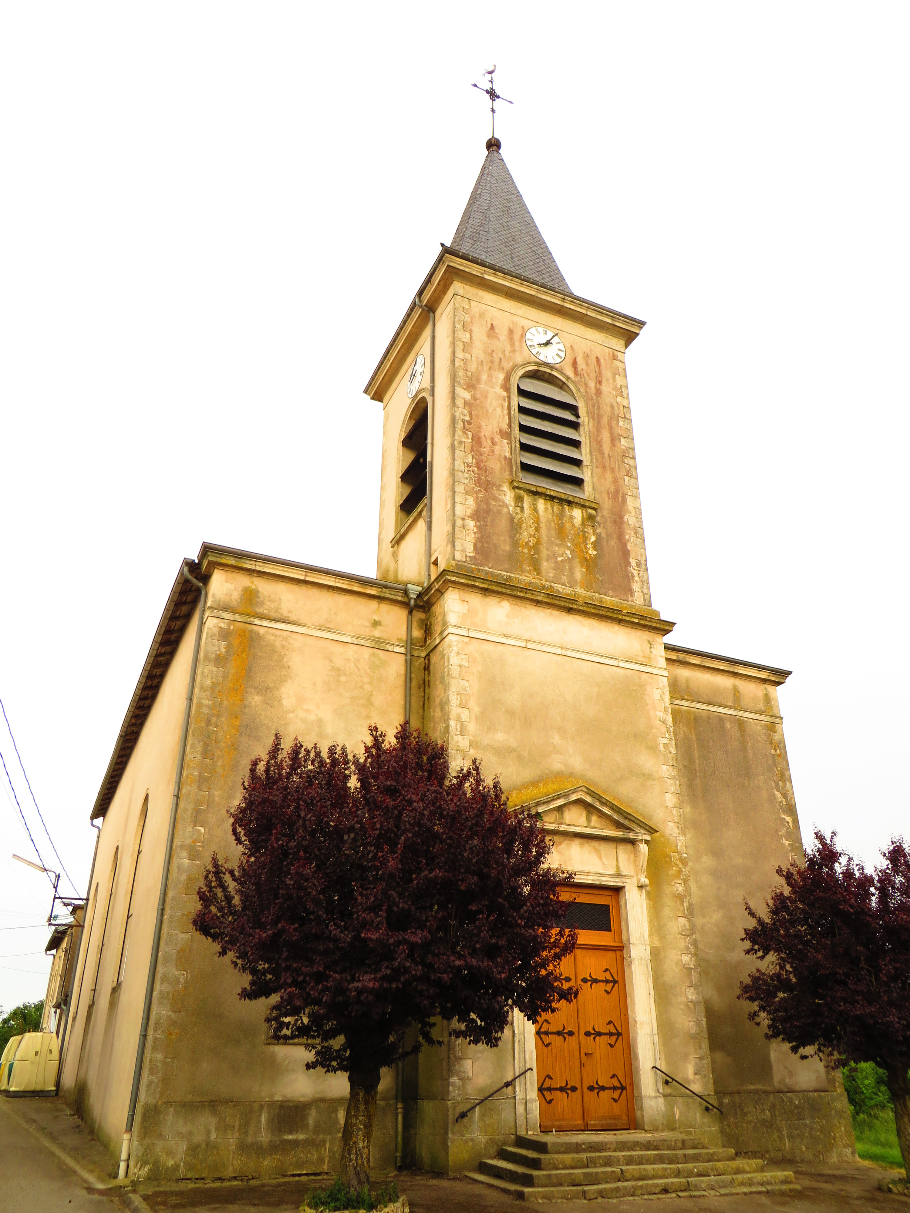 Housseville eglise